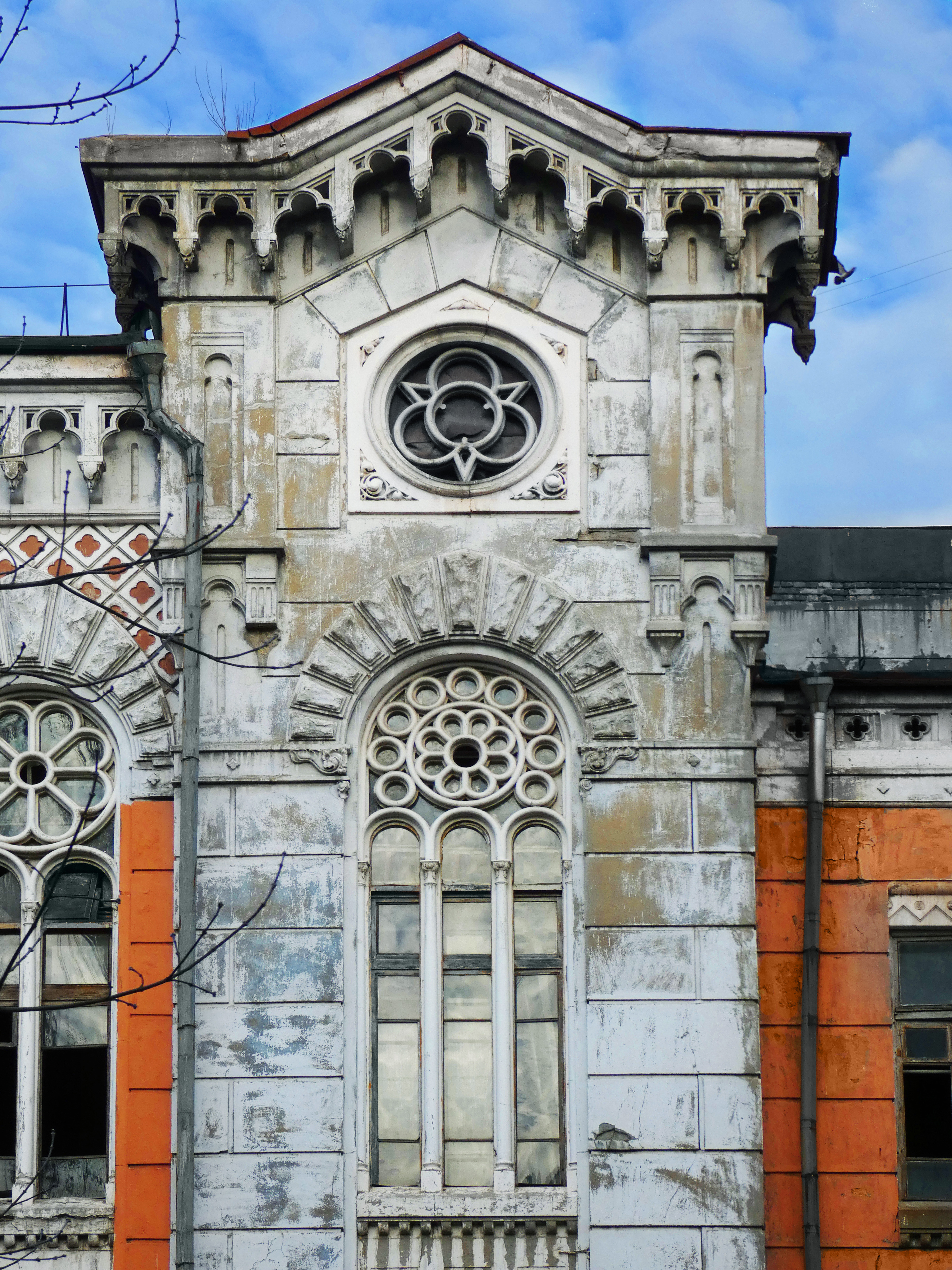 Вежа із щипцем. Садиба товариства швидкої медичної допомоги, Київ, Рейтарська вулиця, 22